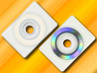 CD визитка